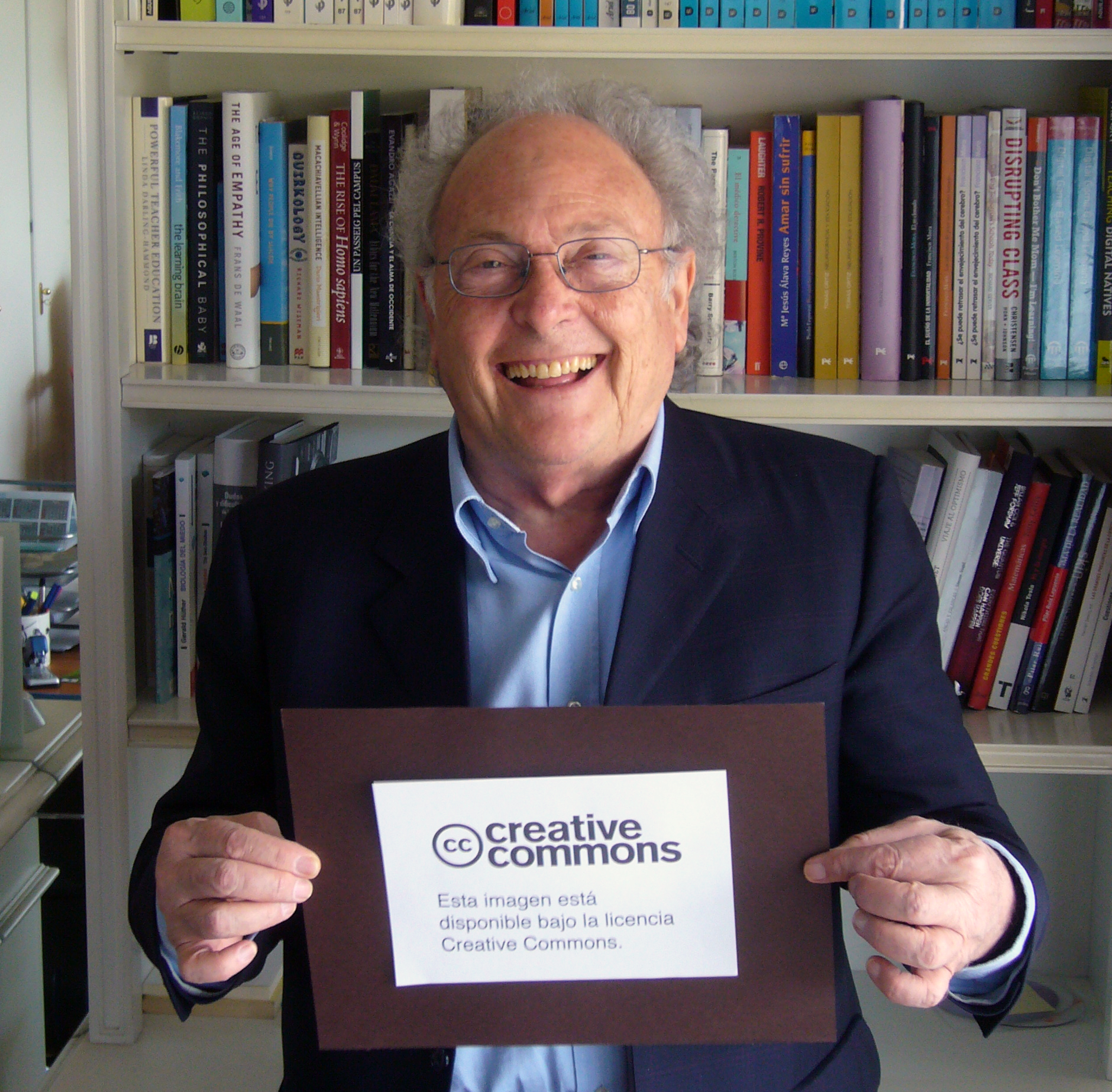 El divulgador científico Eduard Punset posa en el despacho de la oficina de su productora. La foto fue realizada explícitamente para su uso en la Wikipedia.